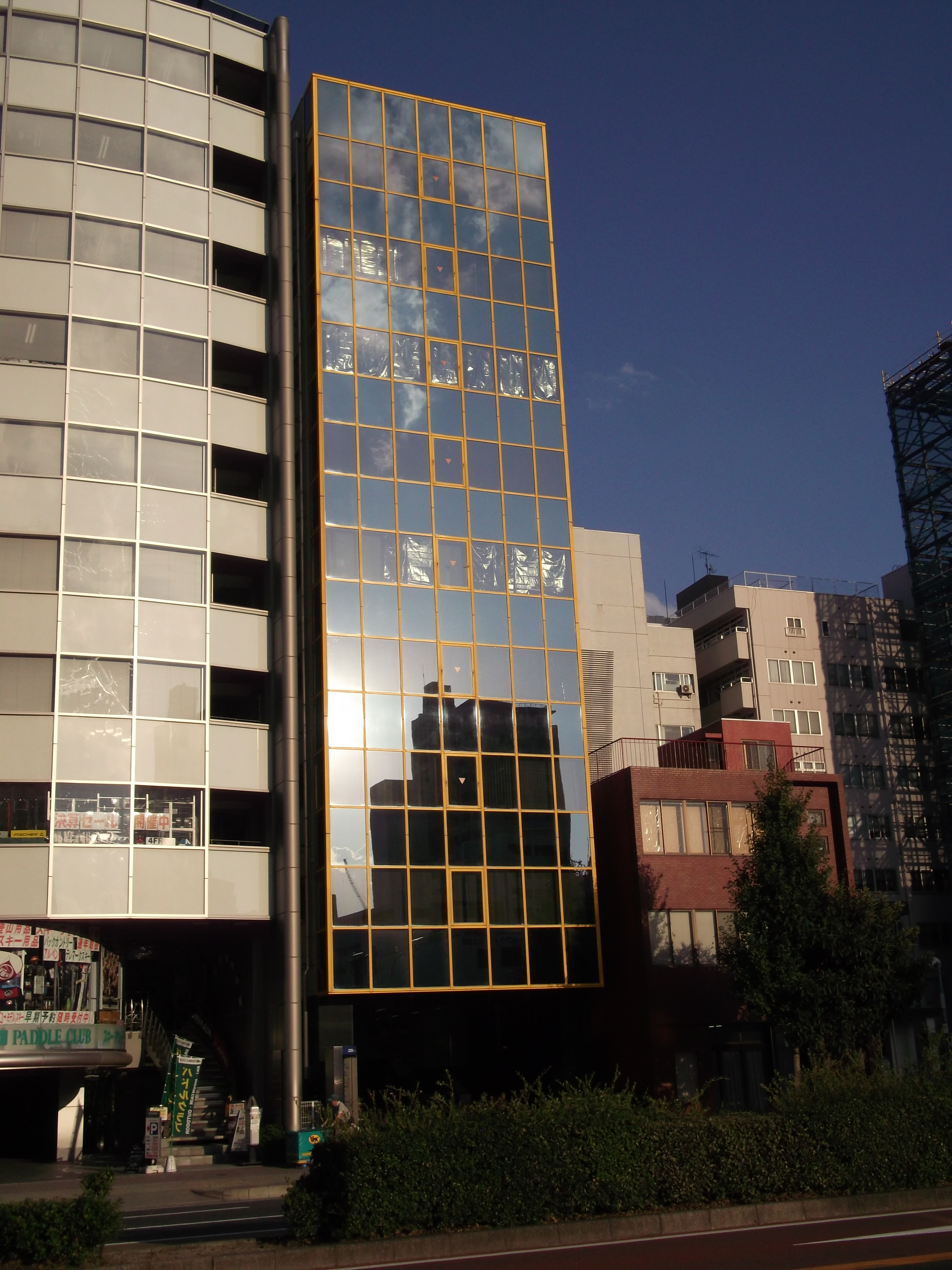 名古屋市中区丸の内三丁目のDDSビルを西側公道北側より撮影